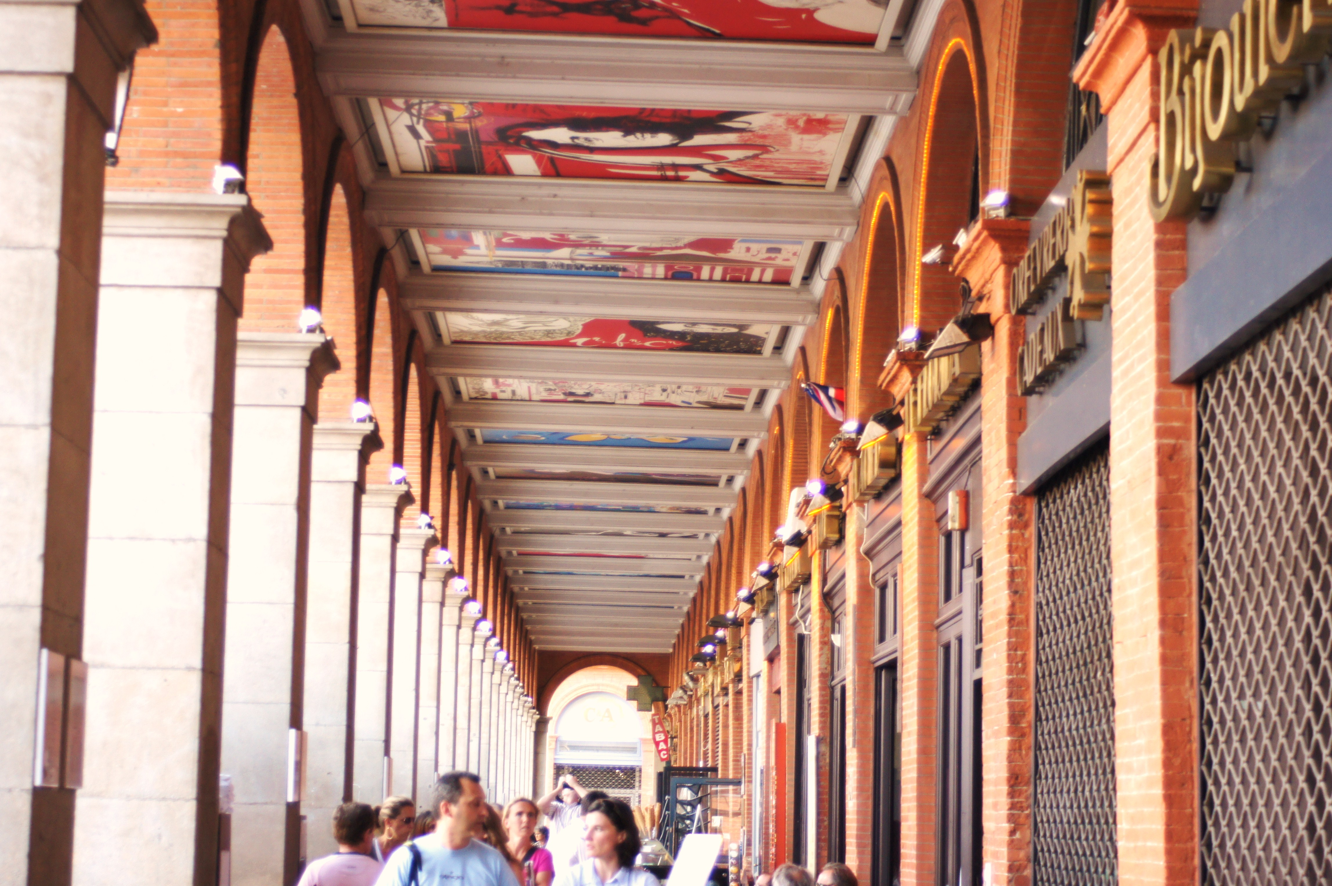 arcades place du capitole TOULOUSE peintures retraçant des moments importants de la région